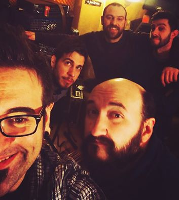 tao te kin en 2016